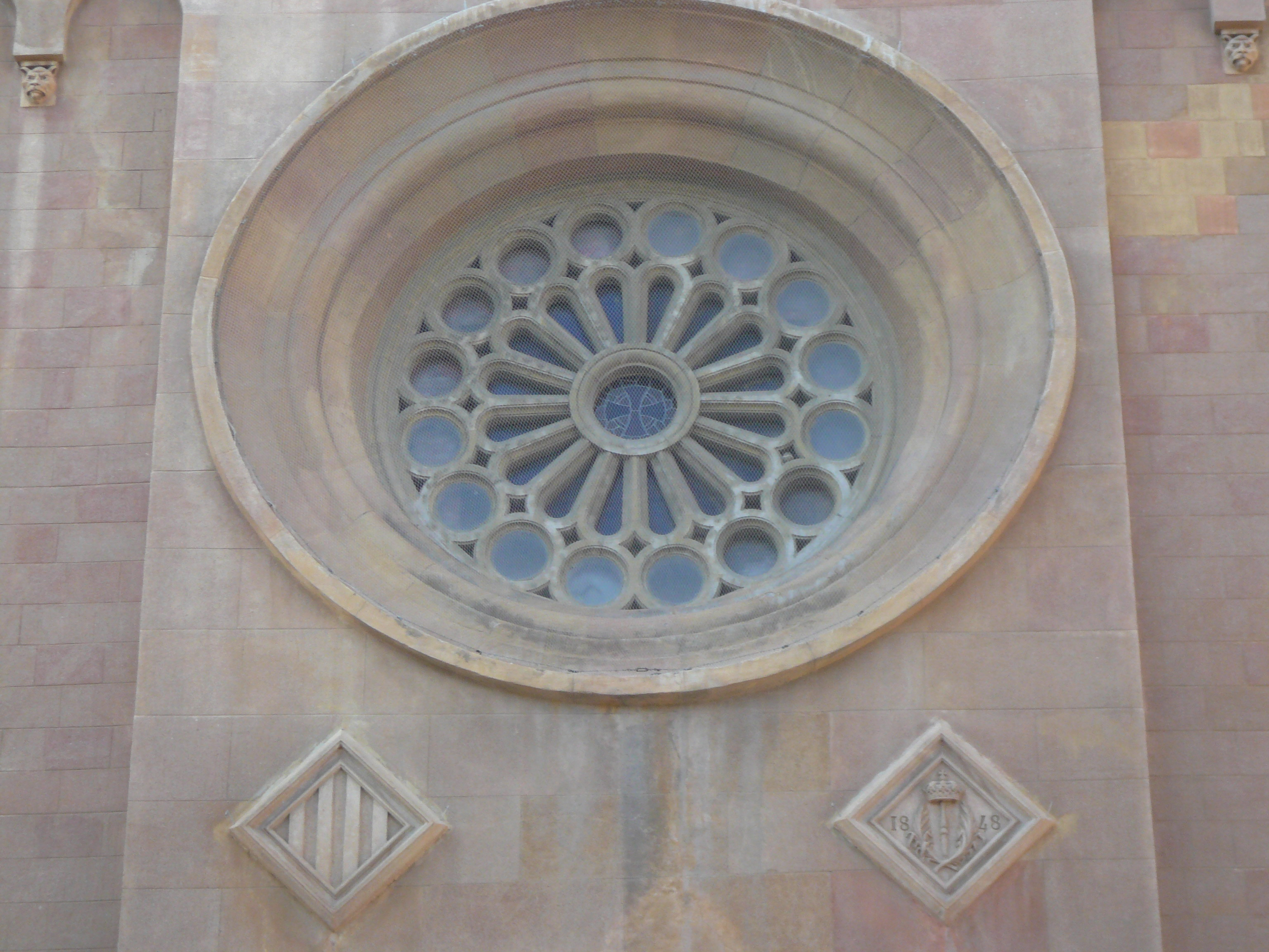 Parròquia de Santa Maria del Remei (Barcelona)